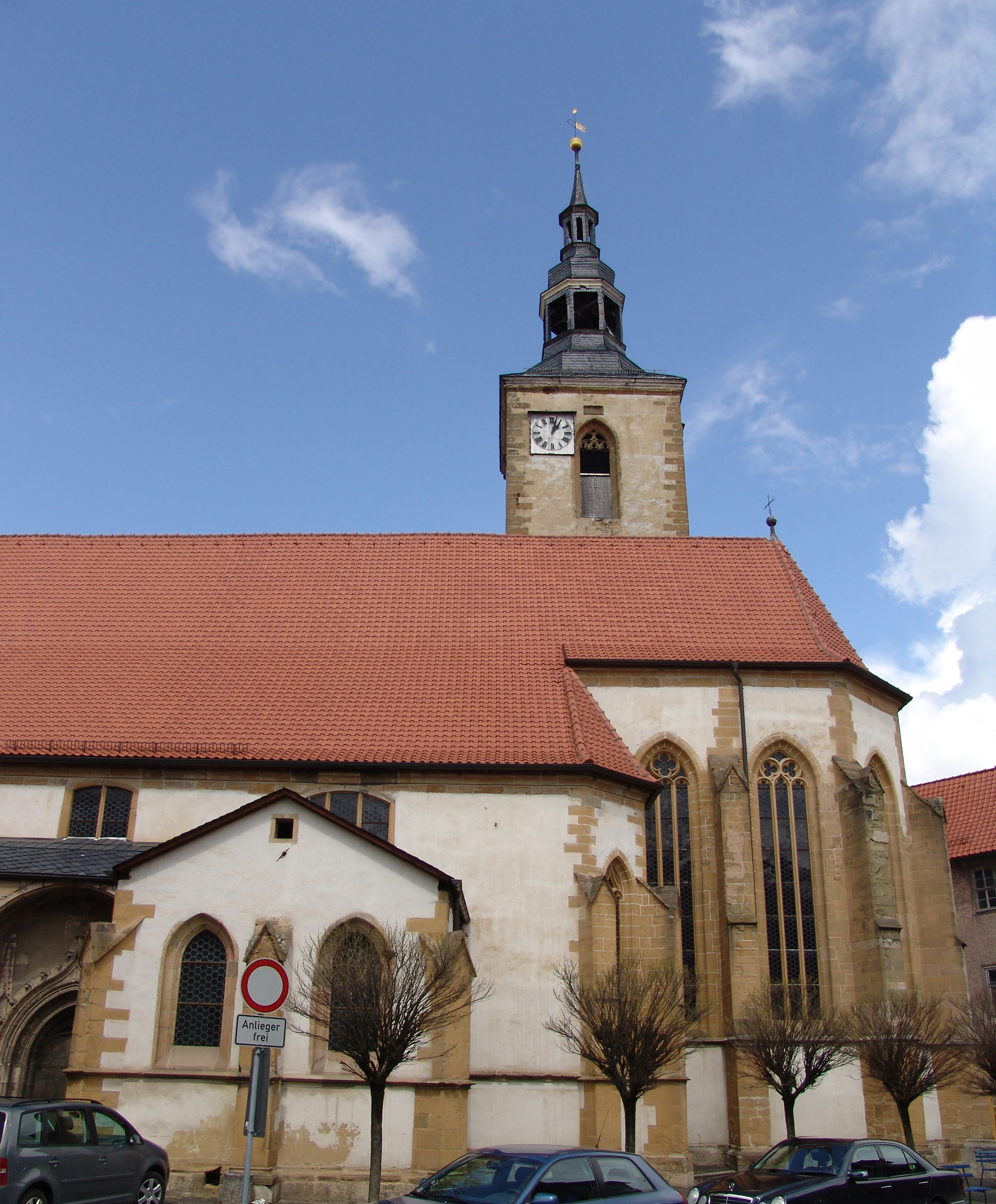 Römhild - Stiftskirche